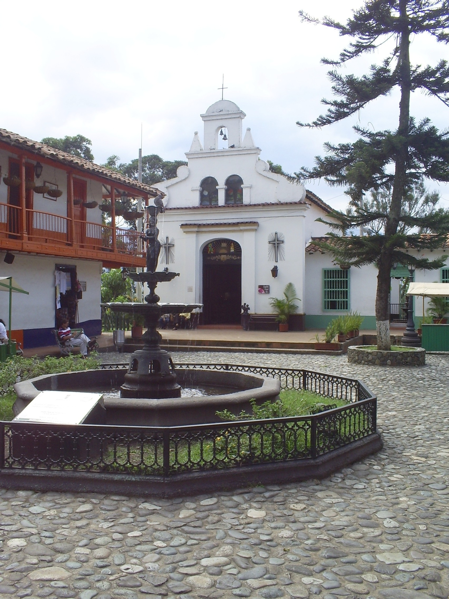 Pueblito Paisa, Medellín, Colombia.